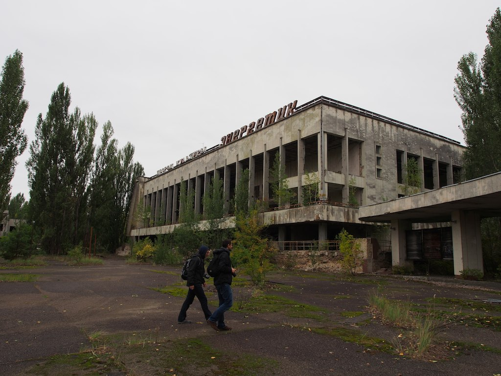 Pripyat